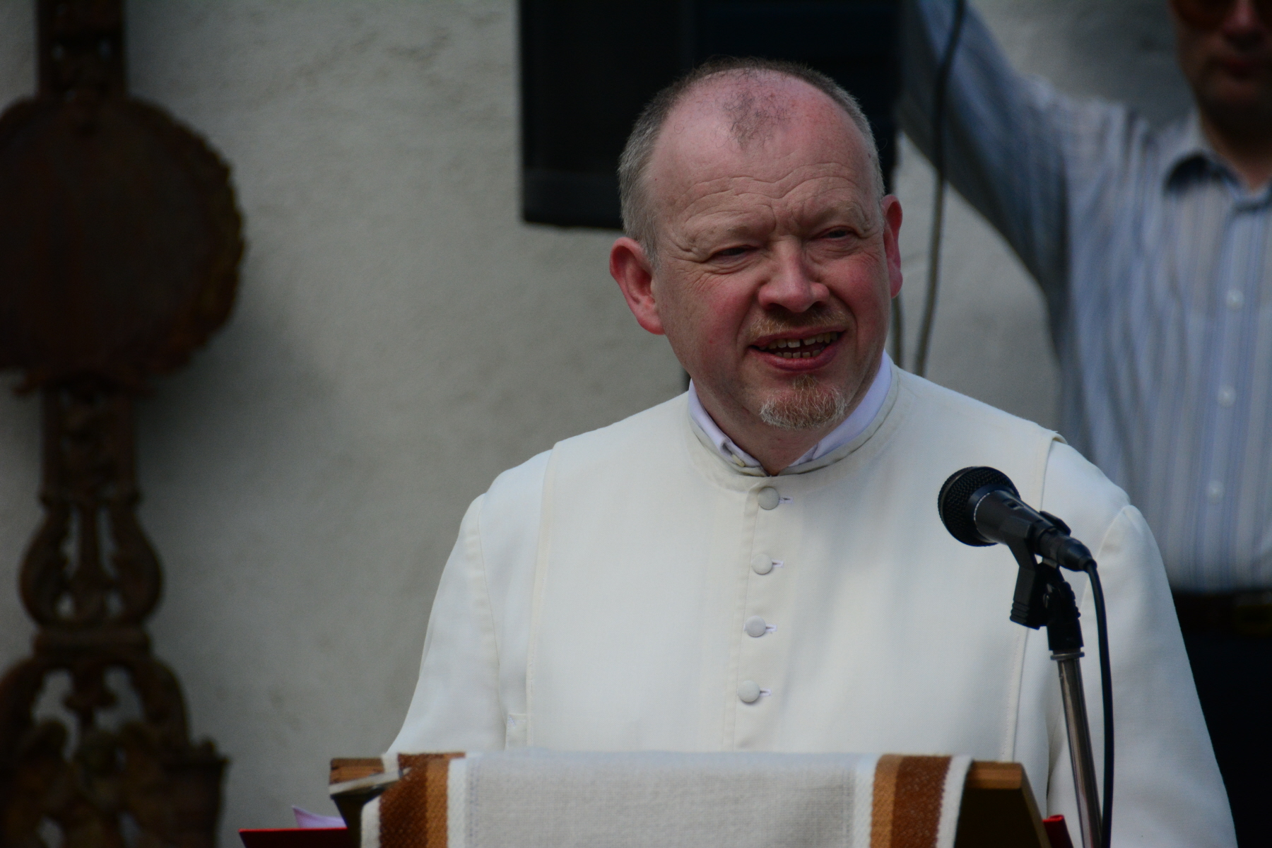 Benedikt Felsinger, Angehöriger des Prämonstratenser-Chorherrenstift Geras in Niederösterreich und bekannt als "neuer" Kräuterpfarrer in Safov/Schaffa in Südmähren